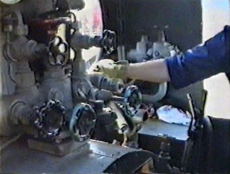 Führerstand „Graf Arnim“(auch Puffer-Billy genannt)